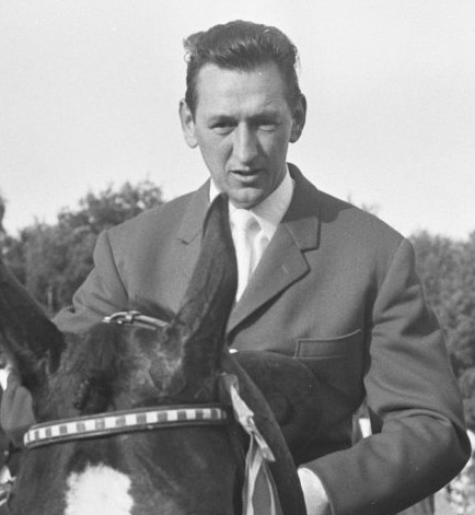 CHIO, Rotterdam (22e): nr. 15 Wouters V. D. Oudenweijer ...